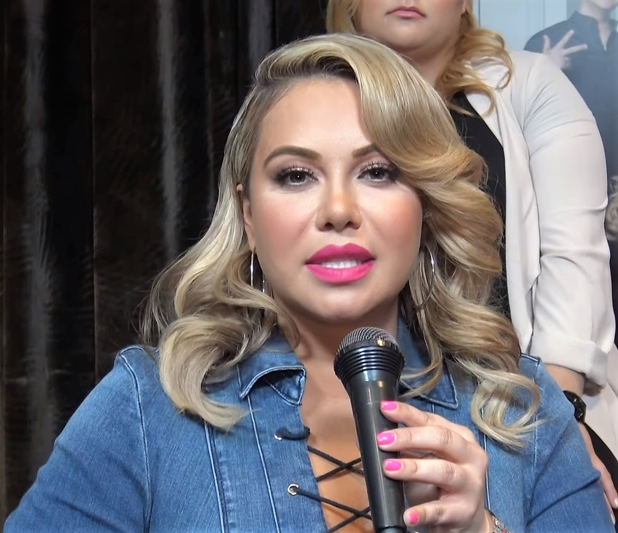 Chiquis Rivera Revela El Consejo de Jenni Rivera que la Marcó y el porque se separó de su novio